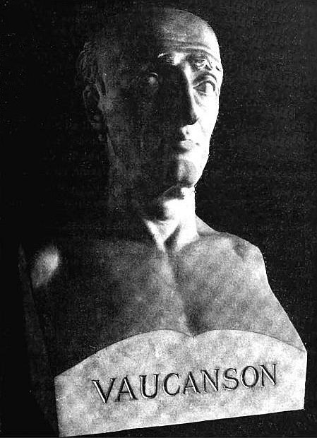 Buste de Jacques de Vaucanson (avant 1835).